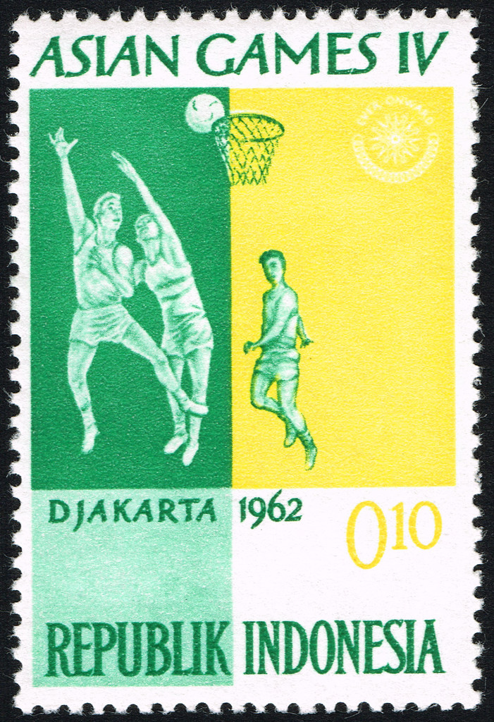 Asian Games IV